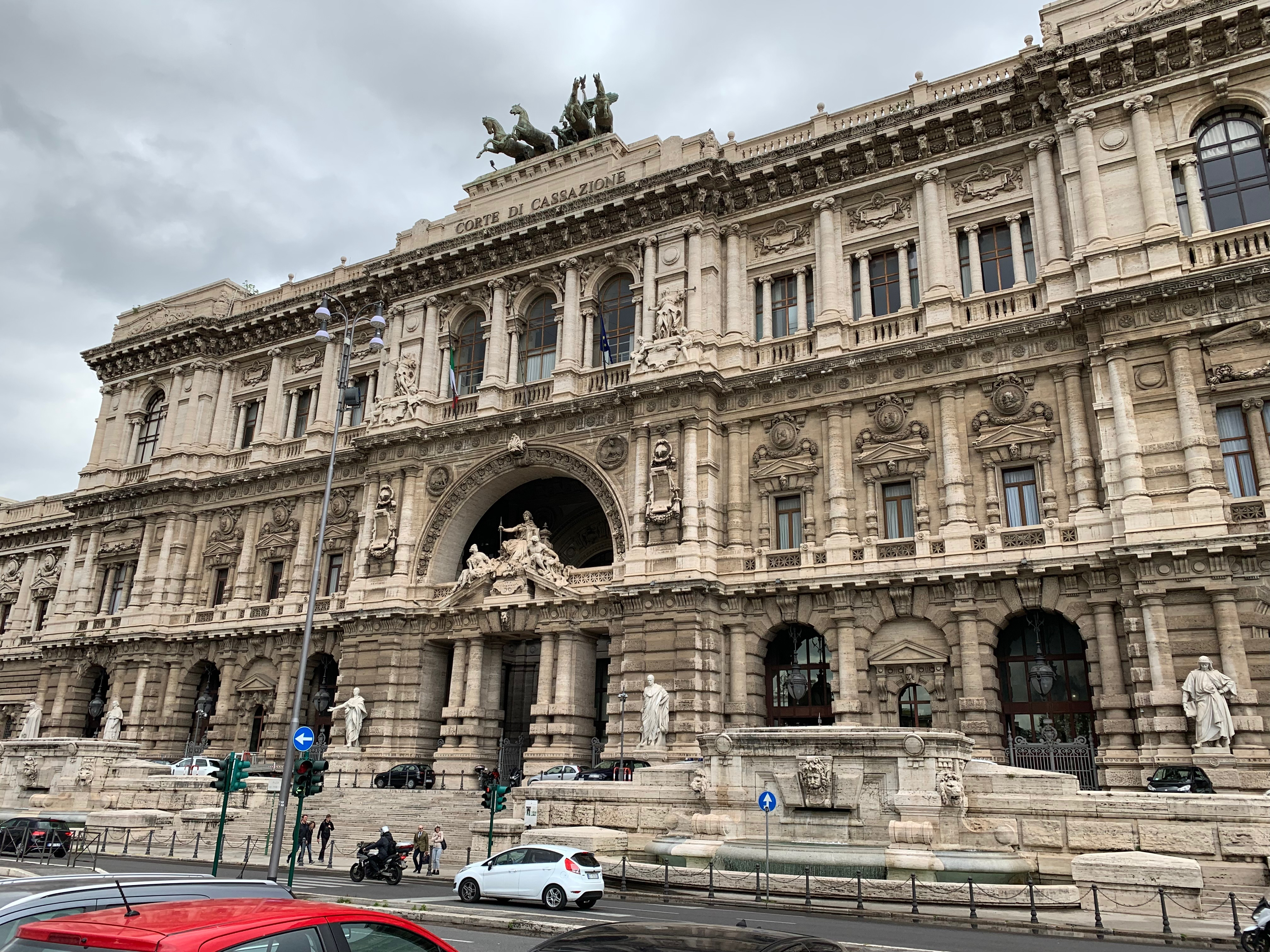 Фото палацу правосуддя в Римі